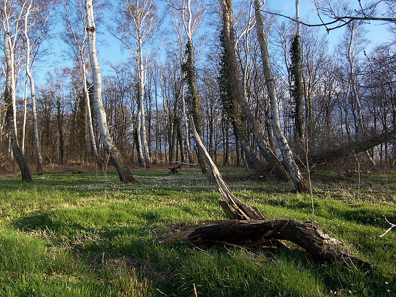 Küstenwald im Landschaftsschutzgebiet Stoltera in Rostock